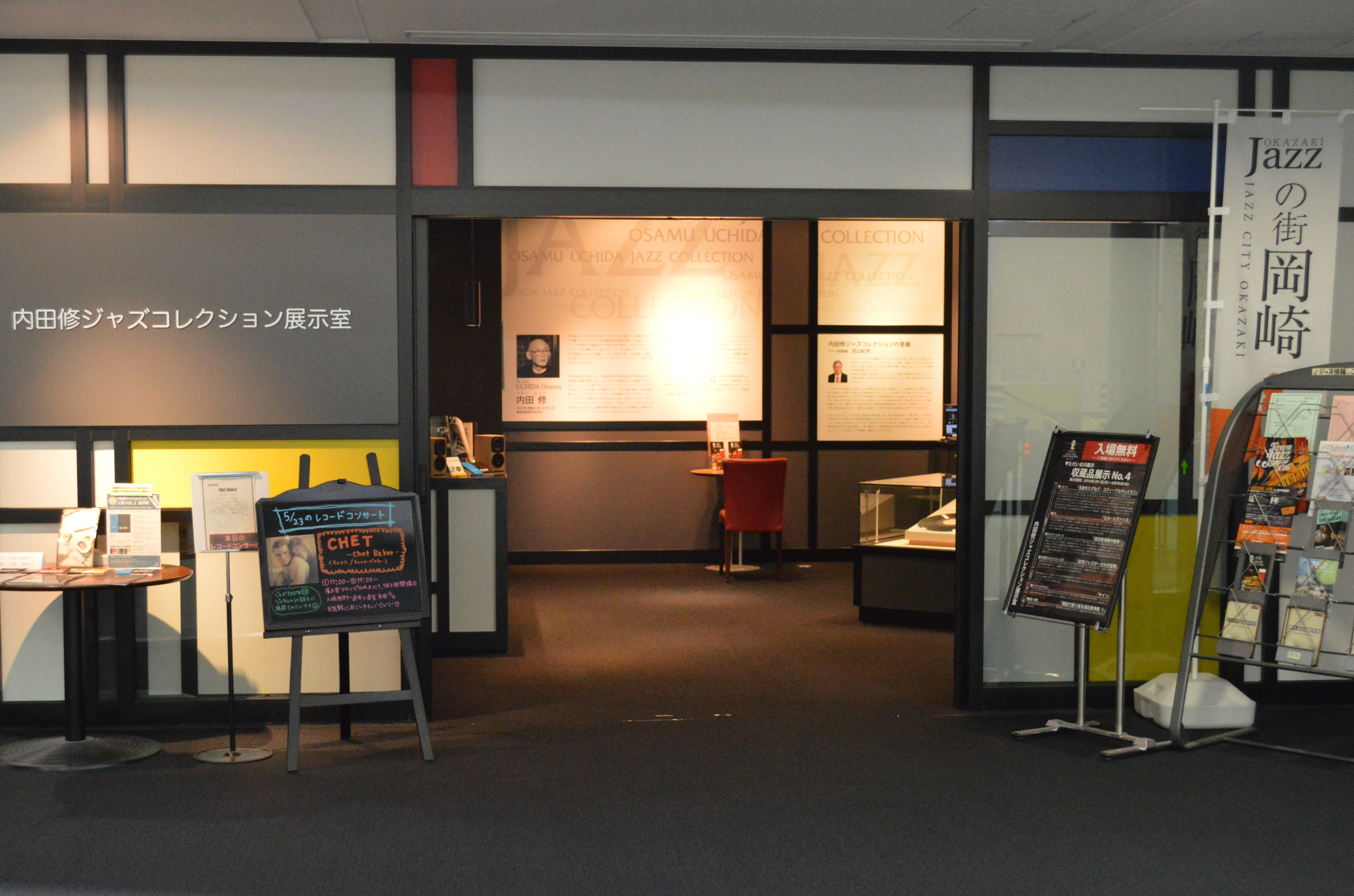 岡崎市図書館交流プラザ（岡崎市立中央図書館）。内田修ジャズコレクション。